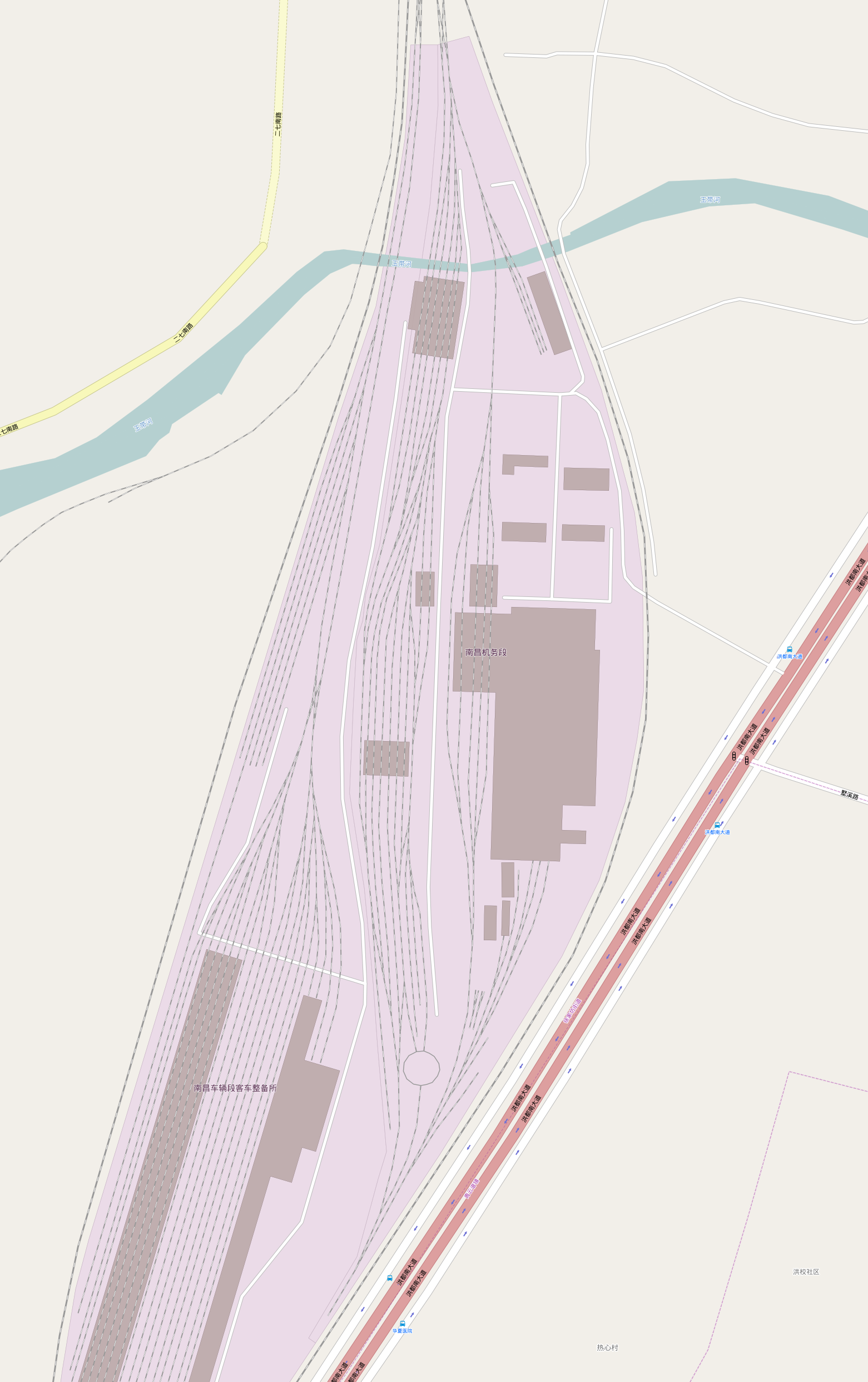 南昌机务段平面图 包括上传者在内的OSM用户贡献